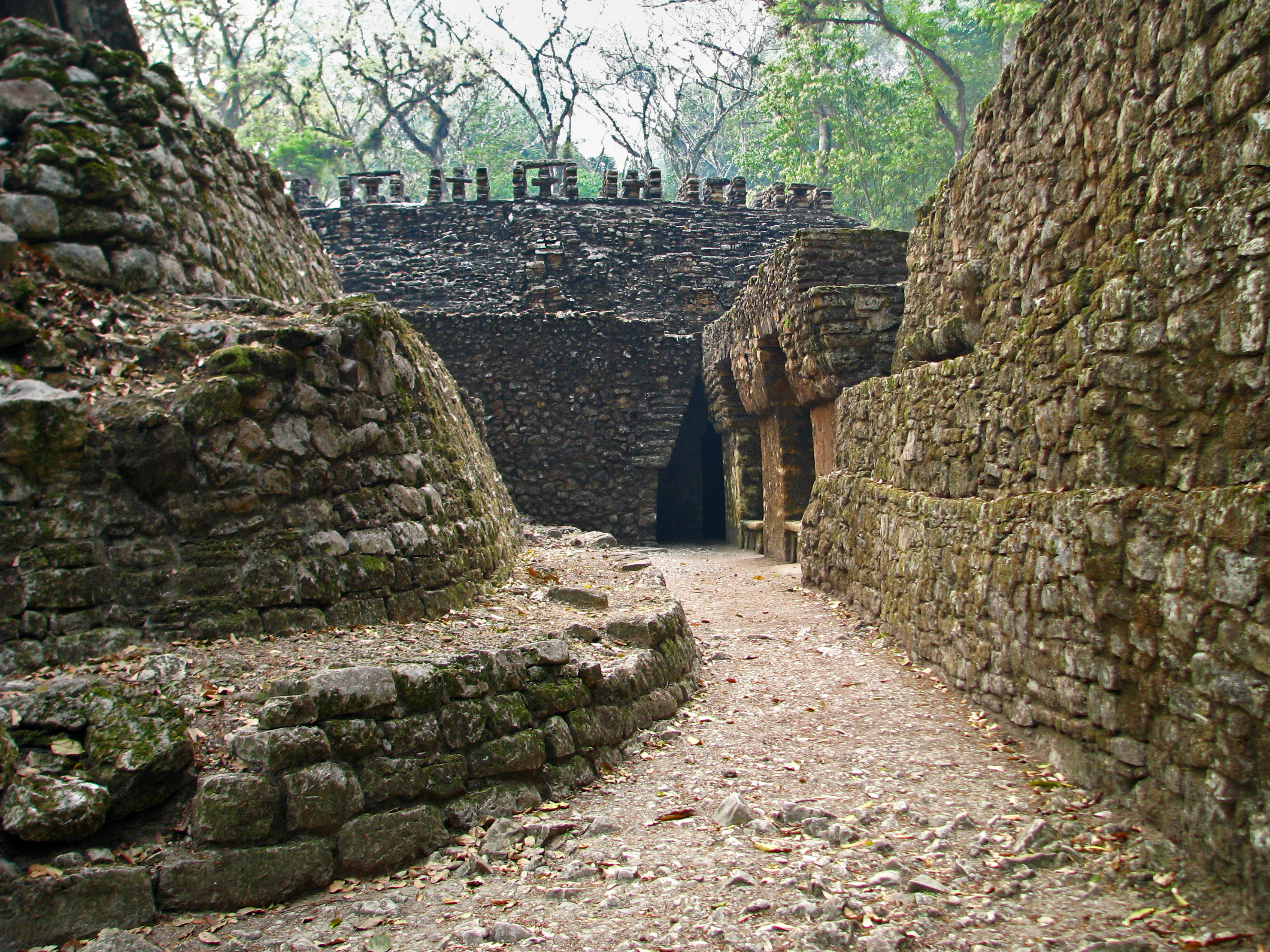 Zona Arqueológica Yaxchilán